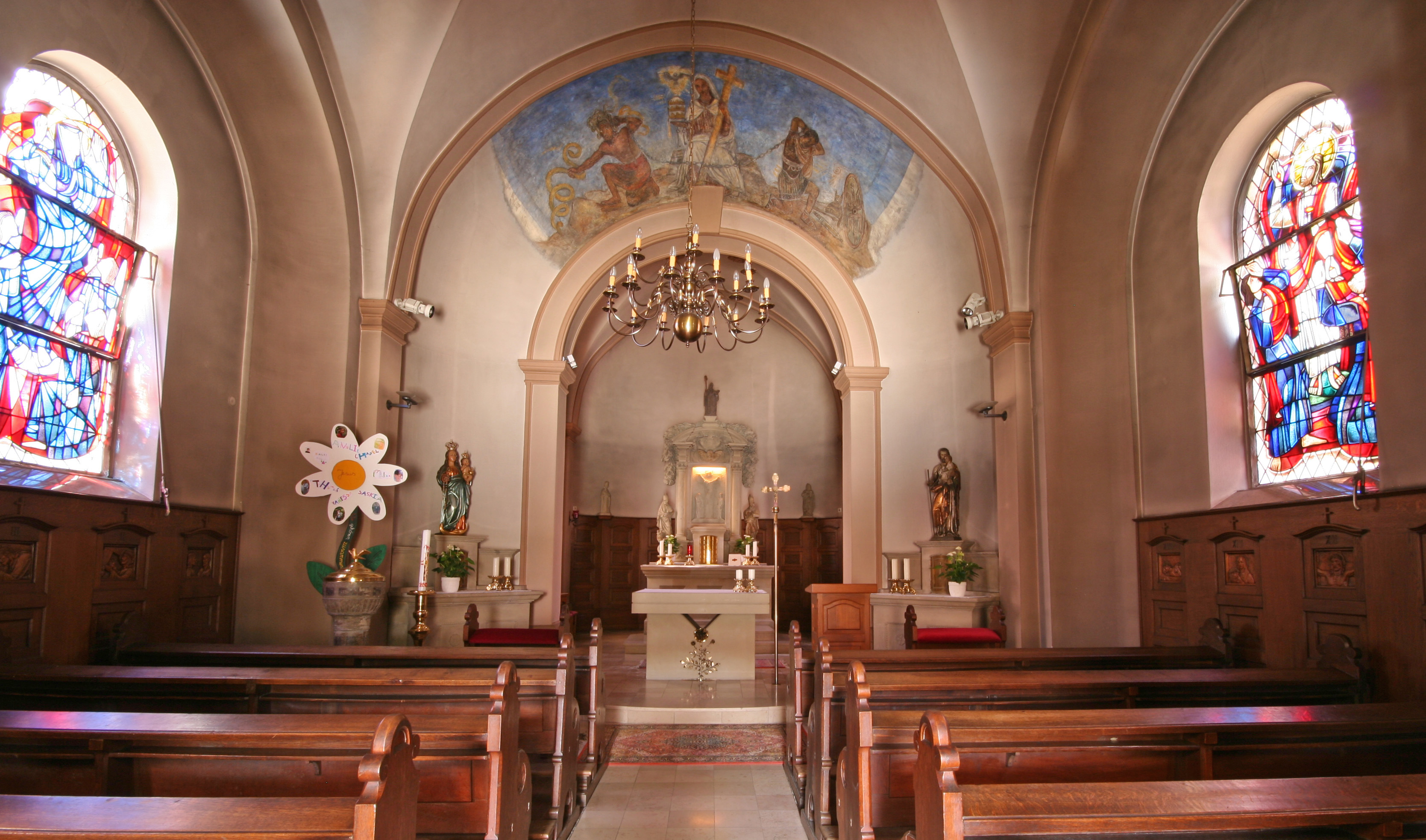 Kierch Steenem Source/Auteur: Fotograf Cornischong